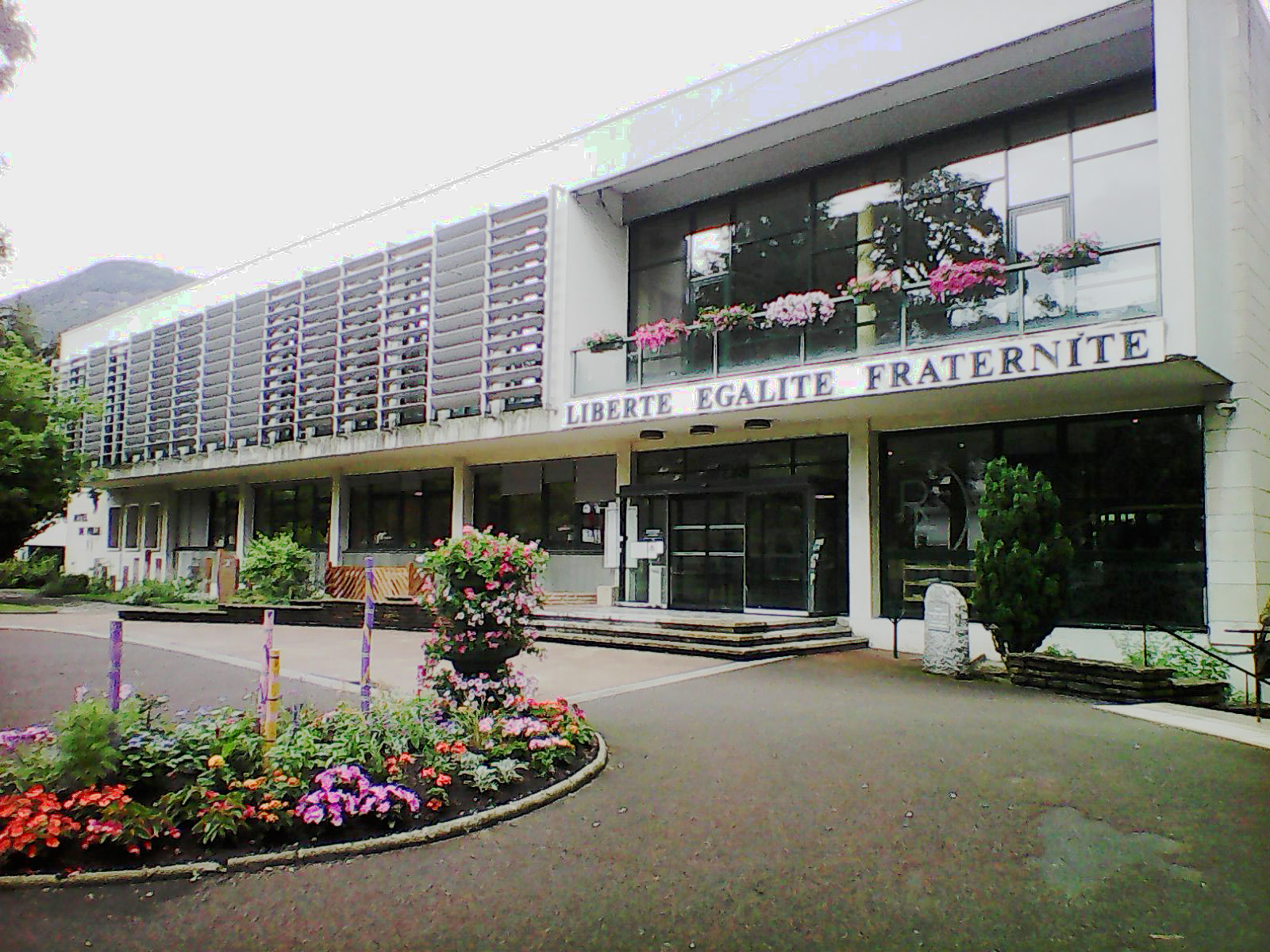 Mairie de Voiron